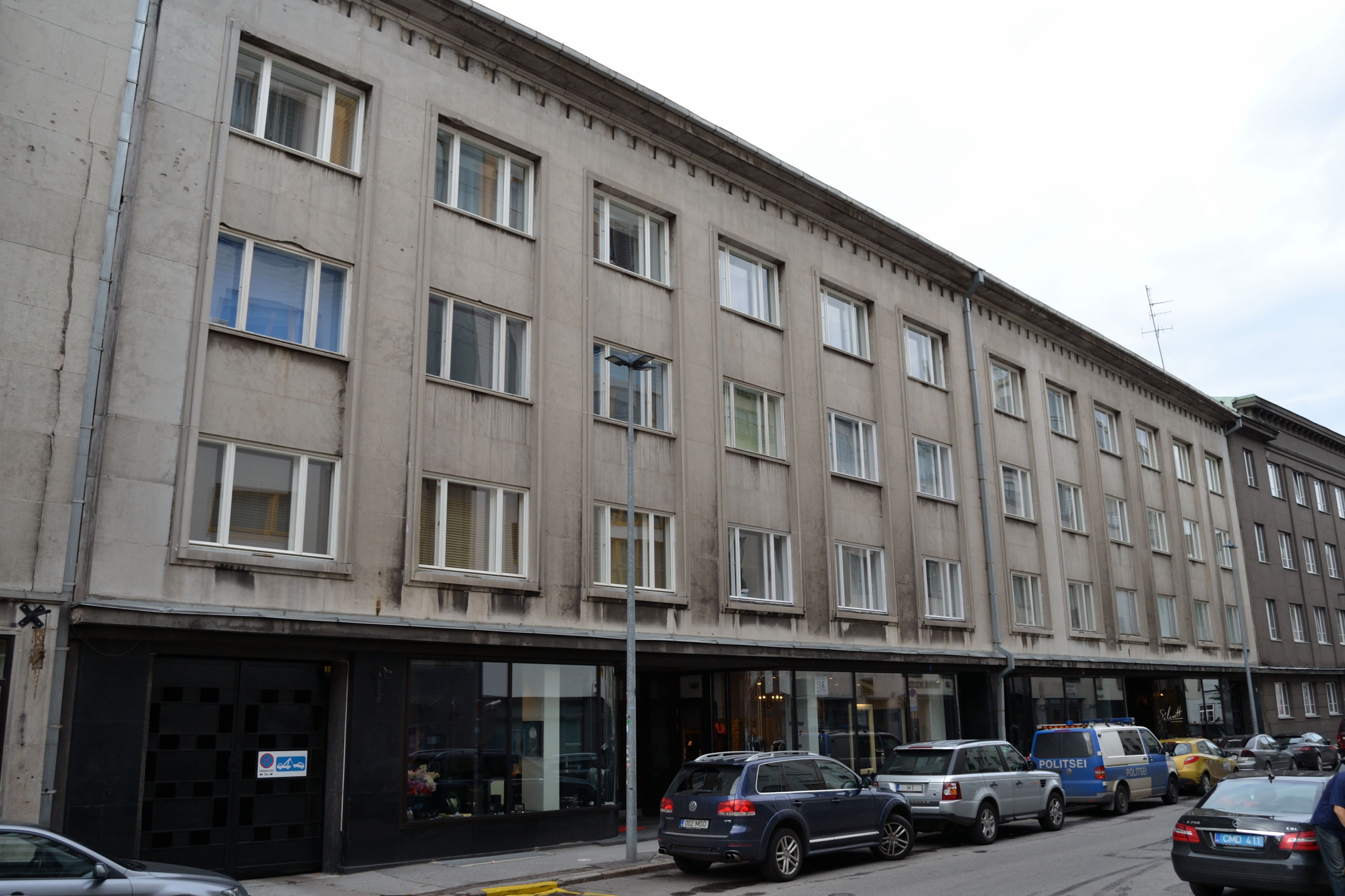 Tallinn, Roosikrantsi 8, 8A